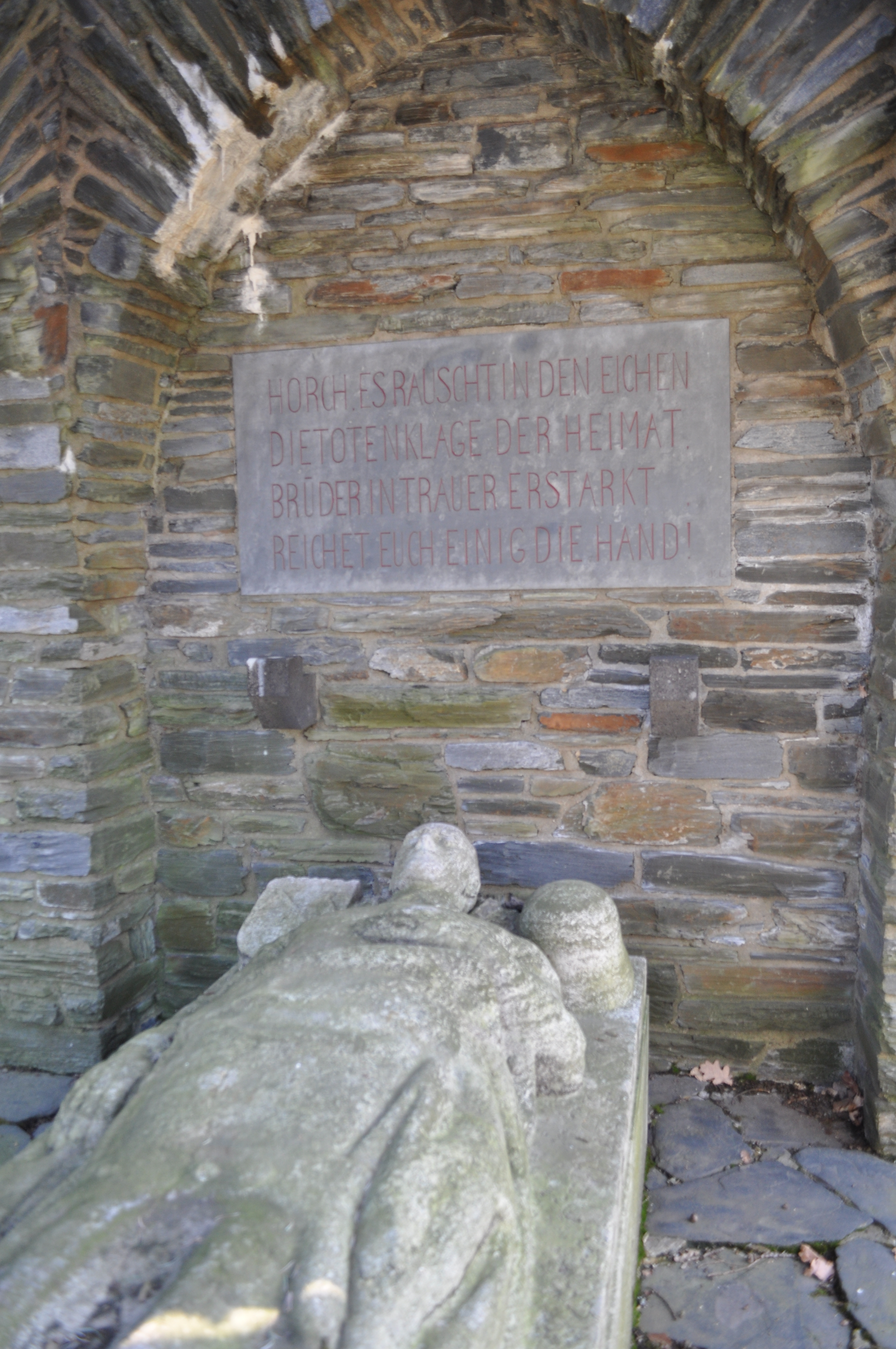 Bad Homburg, Kriegerdenkmal am Rabenstein, Innen